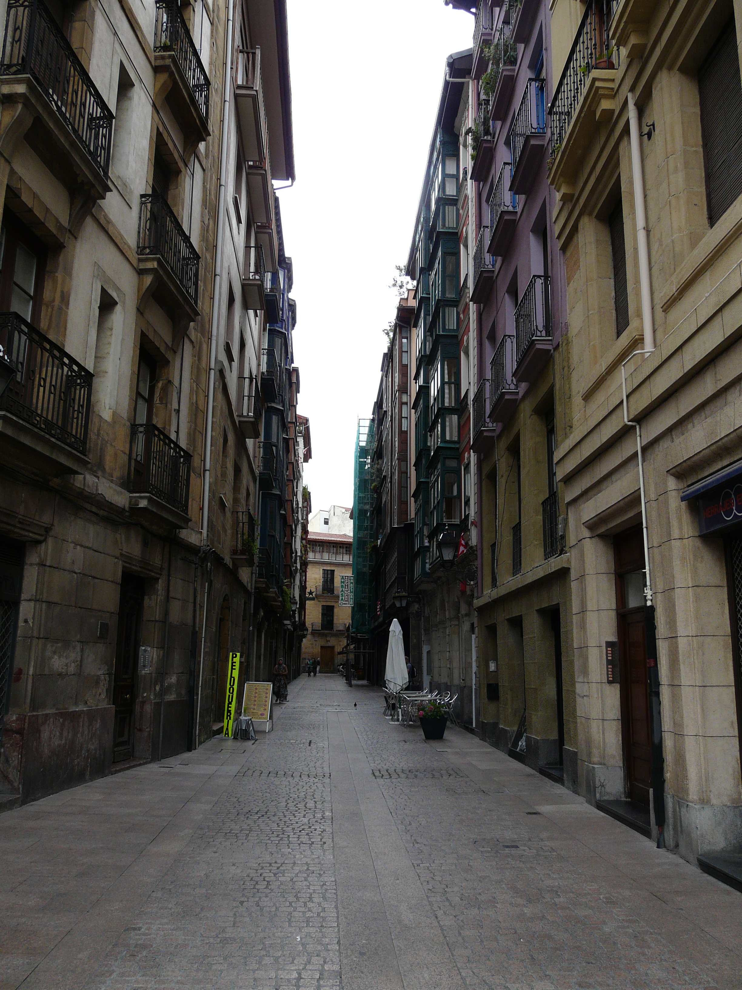 Barrenkale Barrena, un dels Zazpi Kaleak.